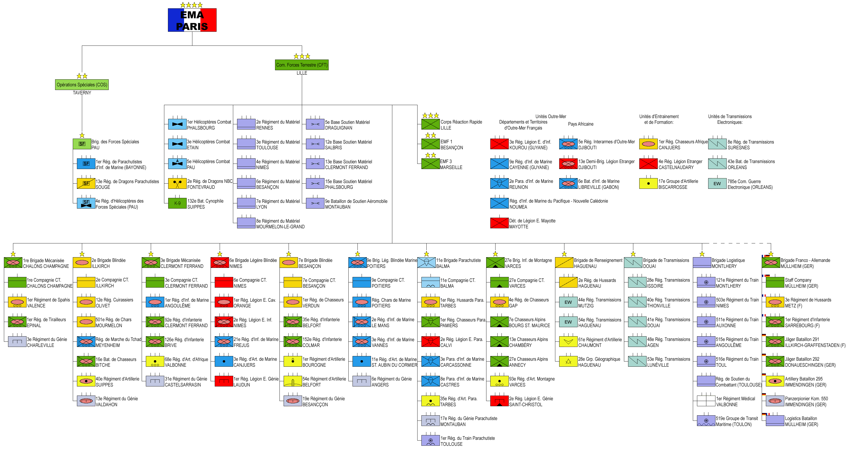 France Armée de Terre Structure; made by myself: noclador